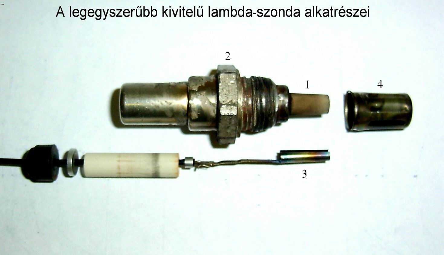 A legegyszerűbb lambda-szonda alkatrészei Saját felvétel, 09.05.2005. Szerző: Dr. Báder Imre